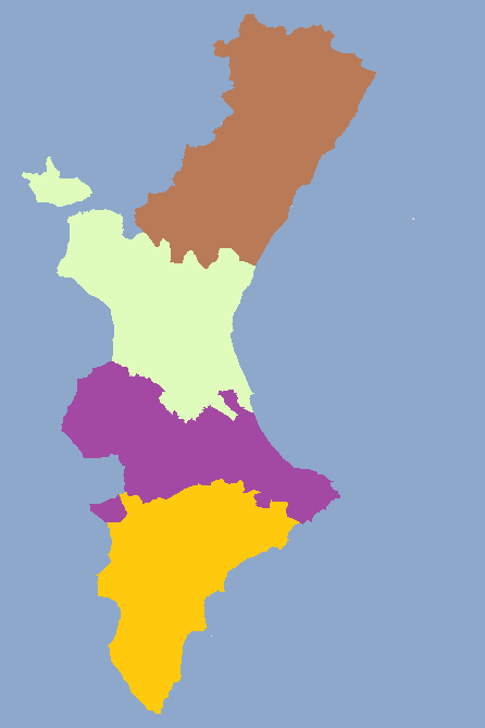 Provincia de Xàtiva dentro de los territorios históricos del Reino de Valencia